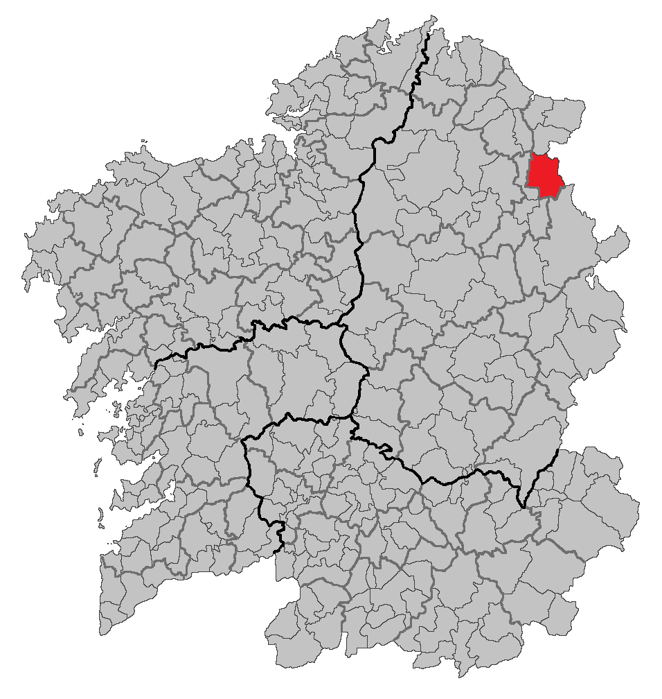 Mapa coa localización do concello de A Pontenova.